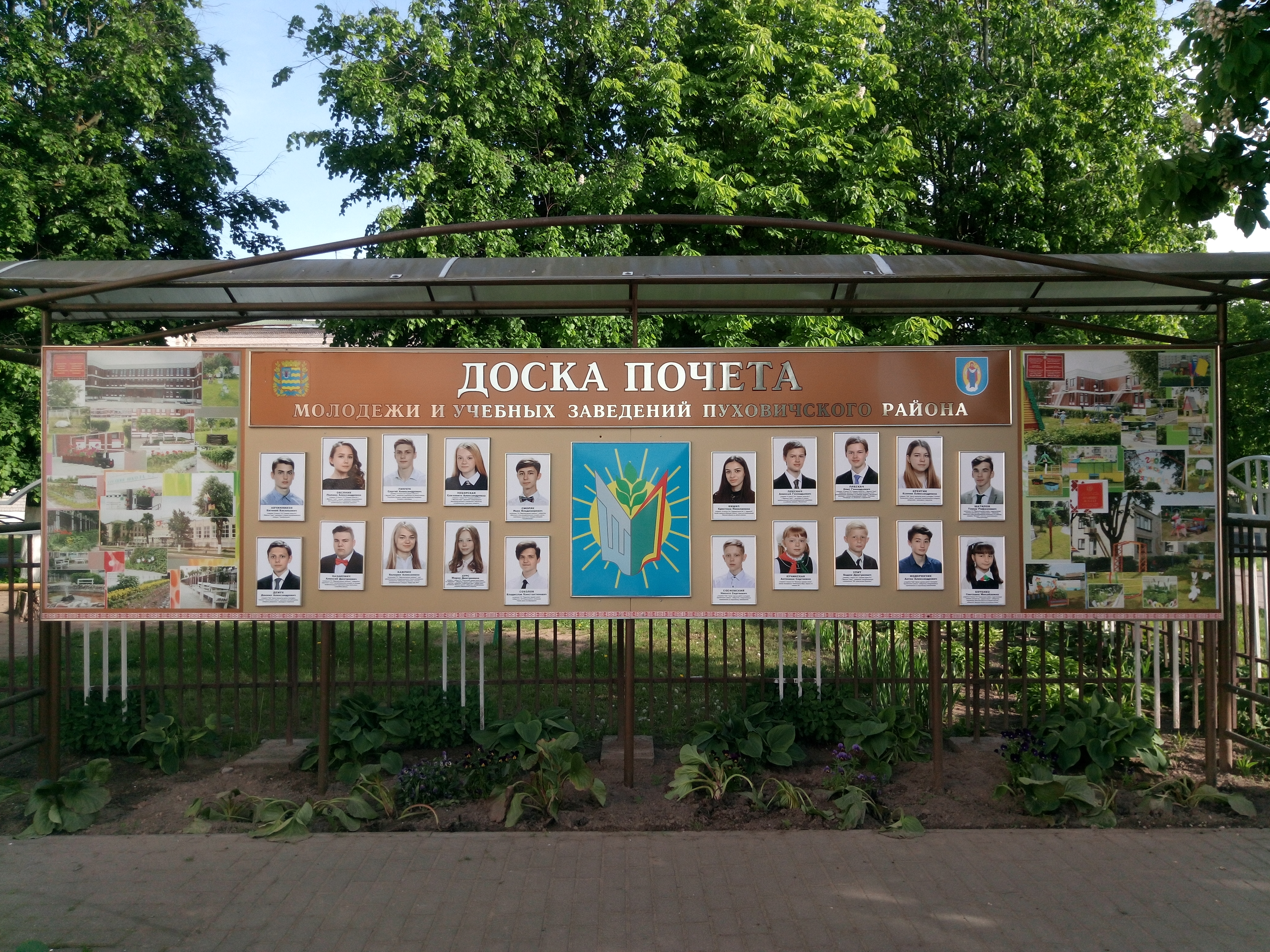 Дошка пашаны моладзі і навучальных устаноў Пухавіцкага раёна, 18 траўня 2019 г.